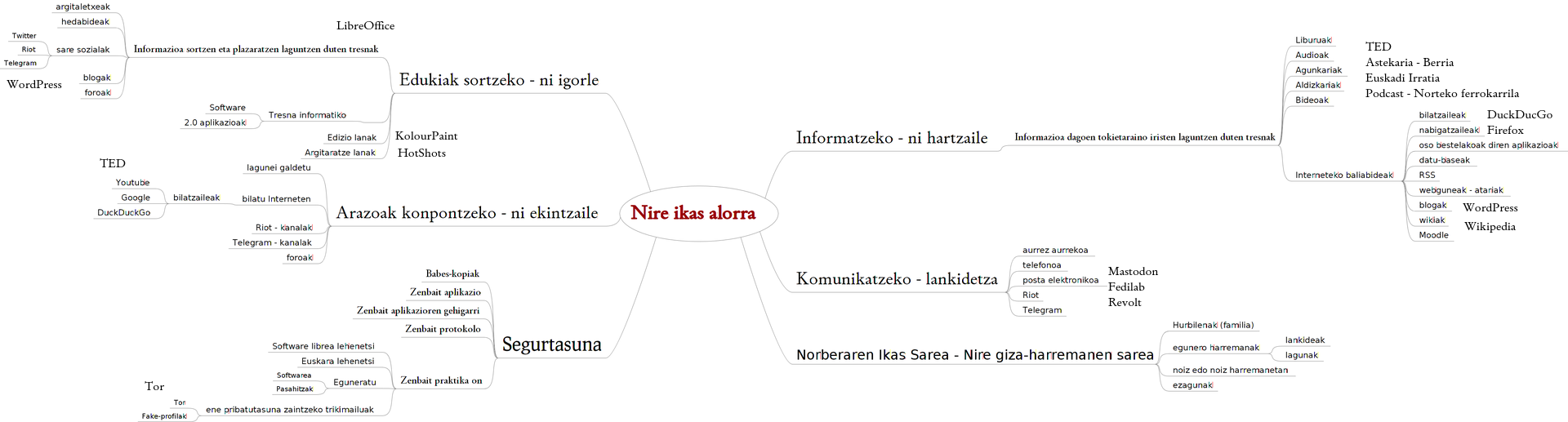 Norberaren Ikas Alorra - Adibide bat (Buru-mapa FreeMind softwarea erabiliz egin da).